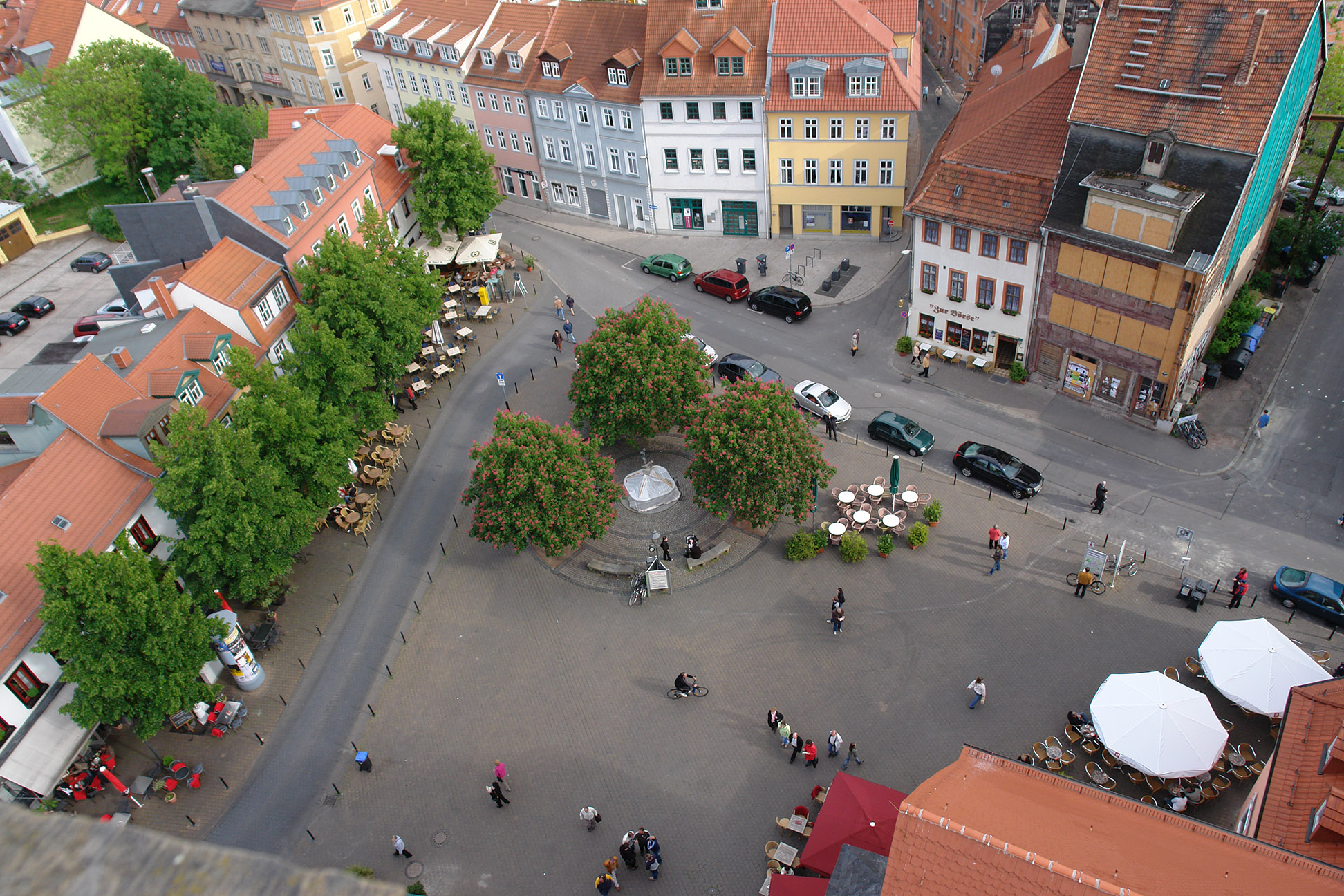 Erfurt, Thuringia, Germany: Wenigemarkt